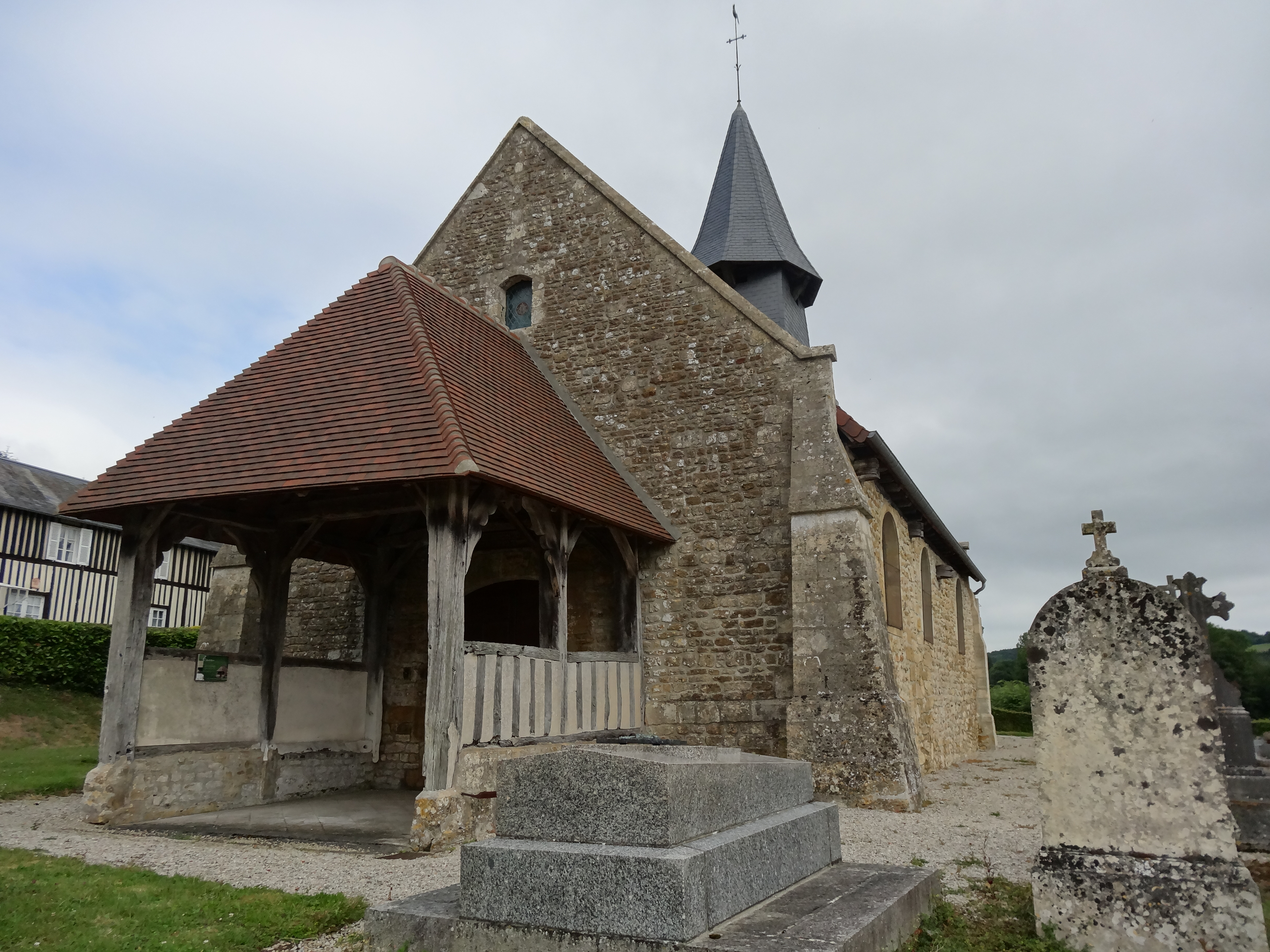 Montreuil-en-Auge,(14) porche et façade ouest de l'église Saint-Roch des XIe et XIIe siècles